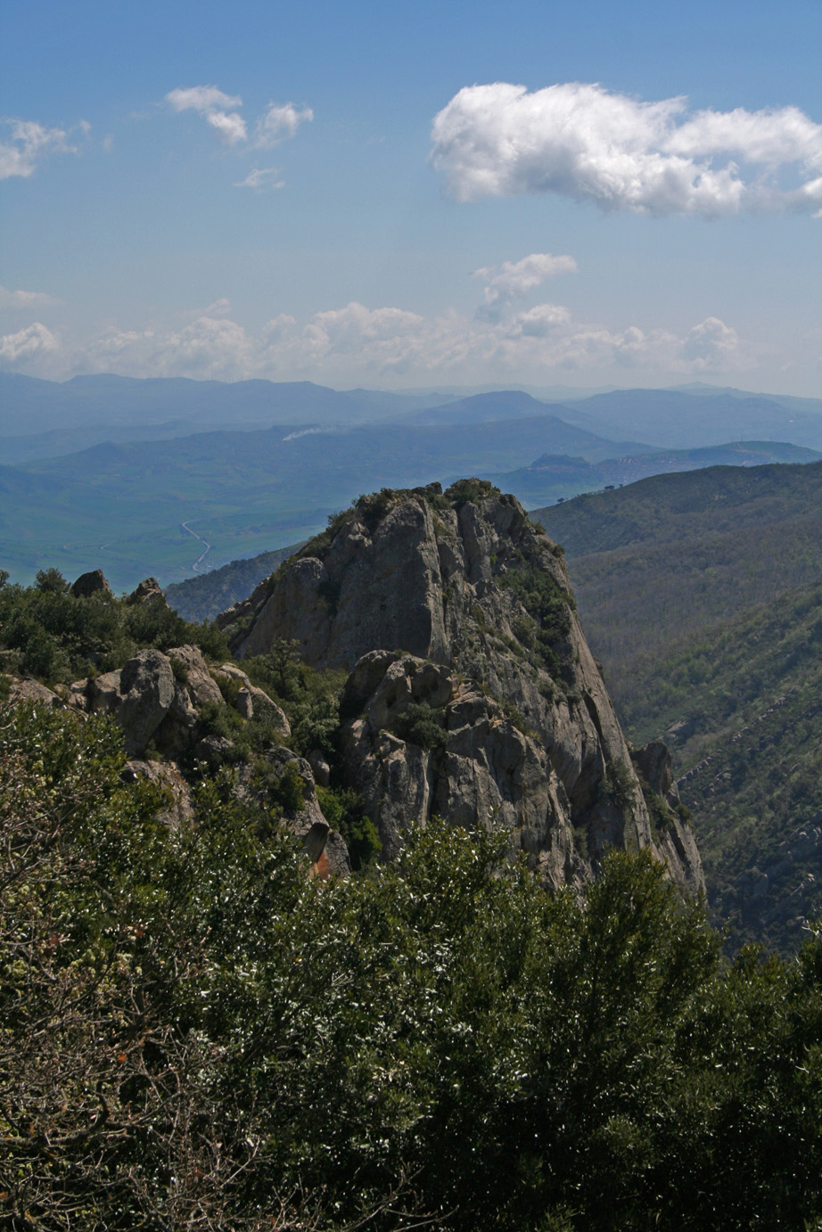 Rocca Busambra (Ficuzza), Sicily